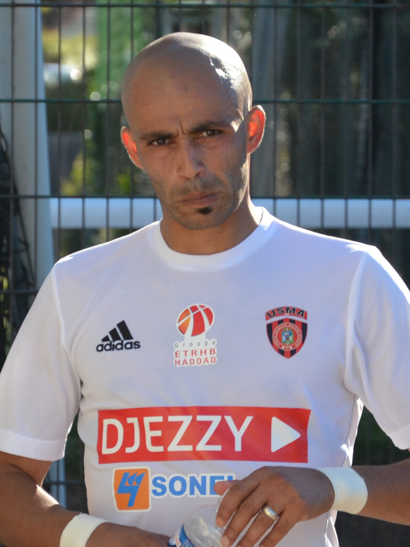 Photographie prise lors du match opposant le Stade rennais à l'USM Alger en match amical au stade Paul-Audrin de Dinard le 16 juillet 2016. Ici, Mokhtar Benmoussa.